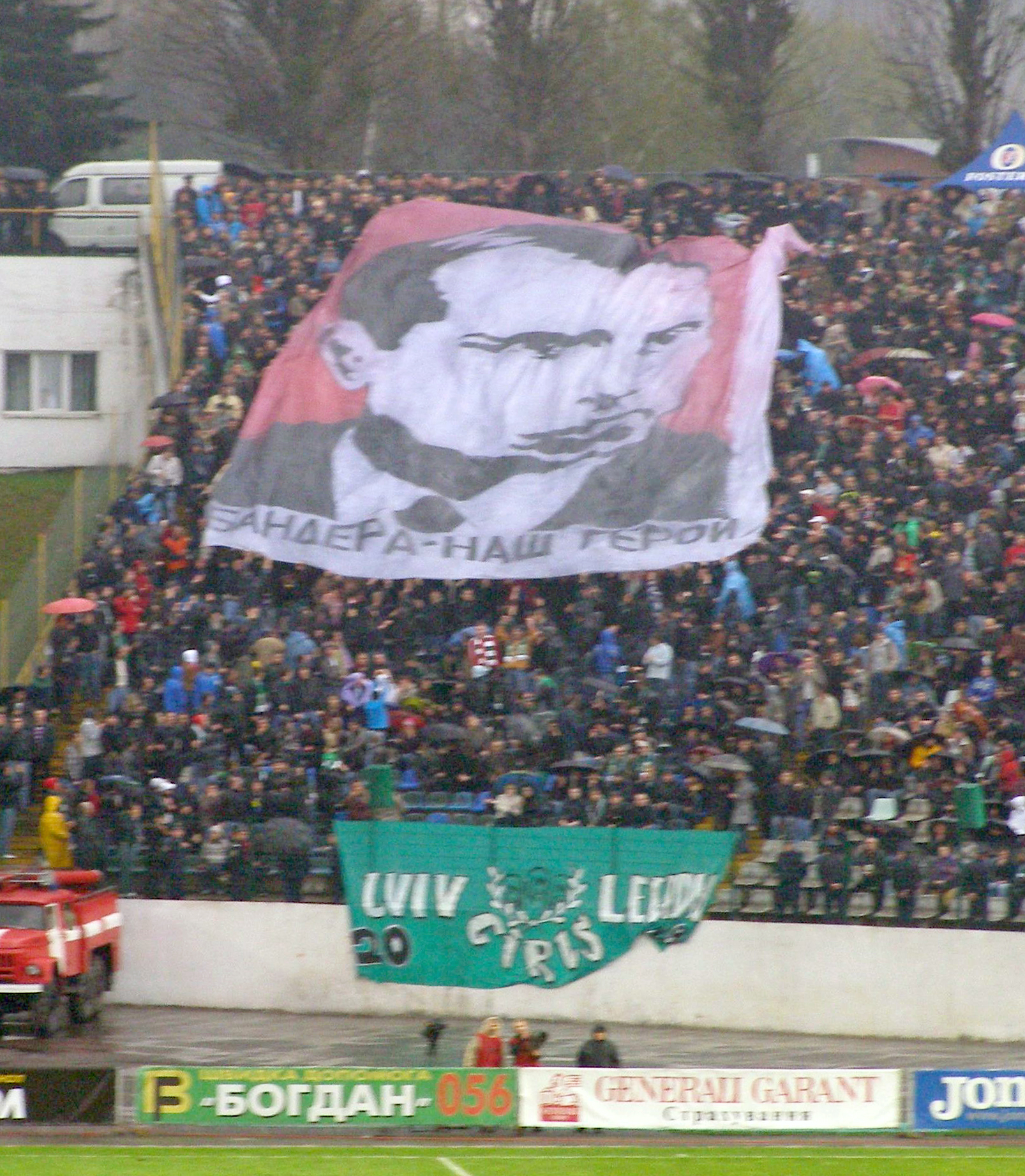 Banner "Bandera - unser Held" auf dem Spiel zwischen Karpaty Lwiw und Schachtar Donezk gezeigt